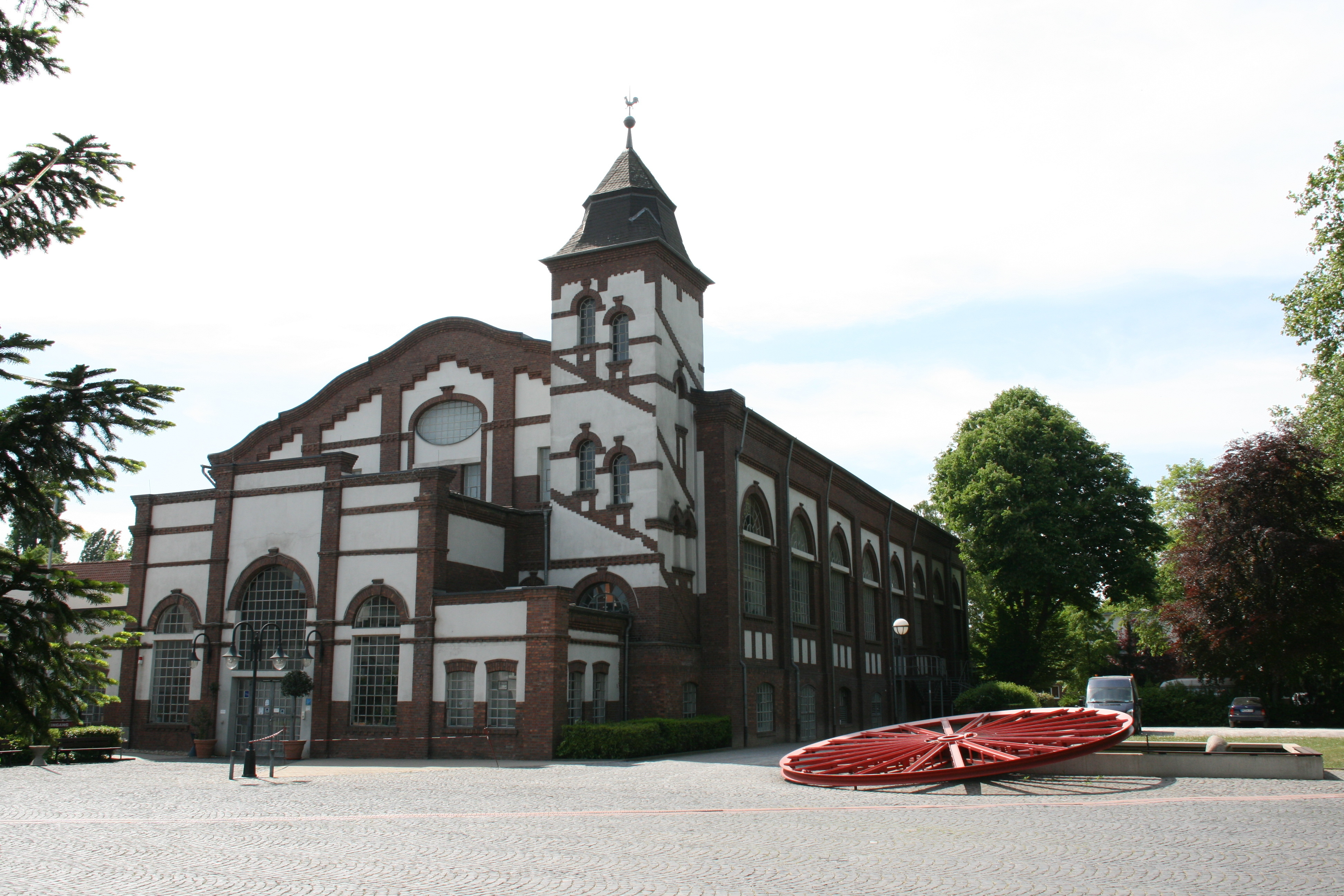 Zeche Graf Bismarck 1/4, Uechtingstraße in Gelsenkirchen